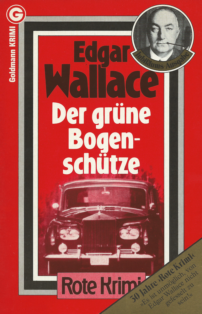 Edgar Wallace: Der grüne Bogenschütze. Goldmann Verlag, München, 1982. DNB